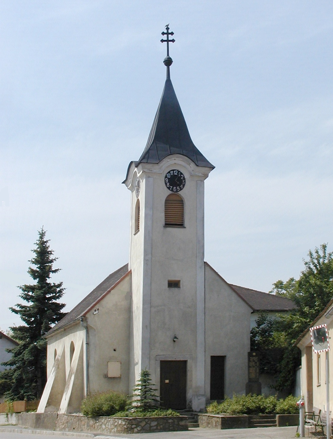 Barocke Dreifaltigkeitskapelle mit nördlich vorgestelltem Turm und stark eingezogener halbrunder Apsis.